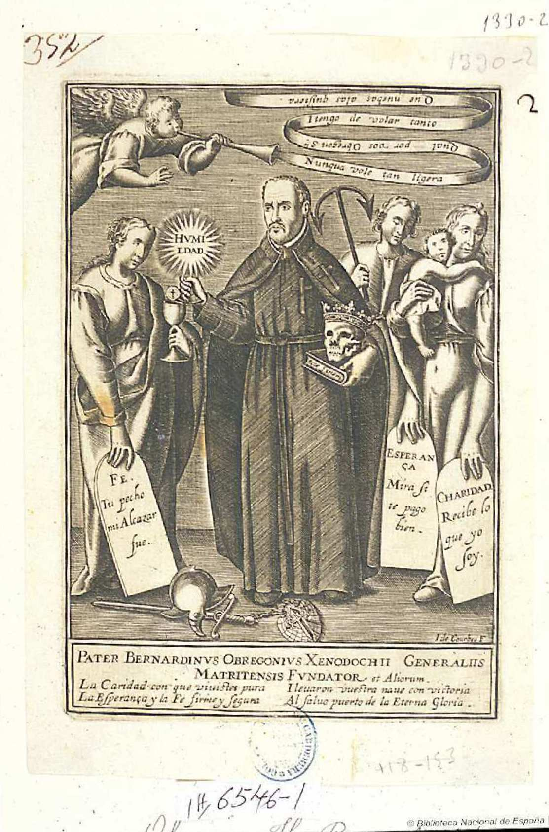 Retrato de Bernardino de Obregón, estampa, 112 x 173 mm. Inscripción al pie: Pater Bernardinus Obregonius Xenodochii Generalis Matritensis Fundator. Madrid, Biblioteca Nacional de España